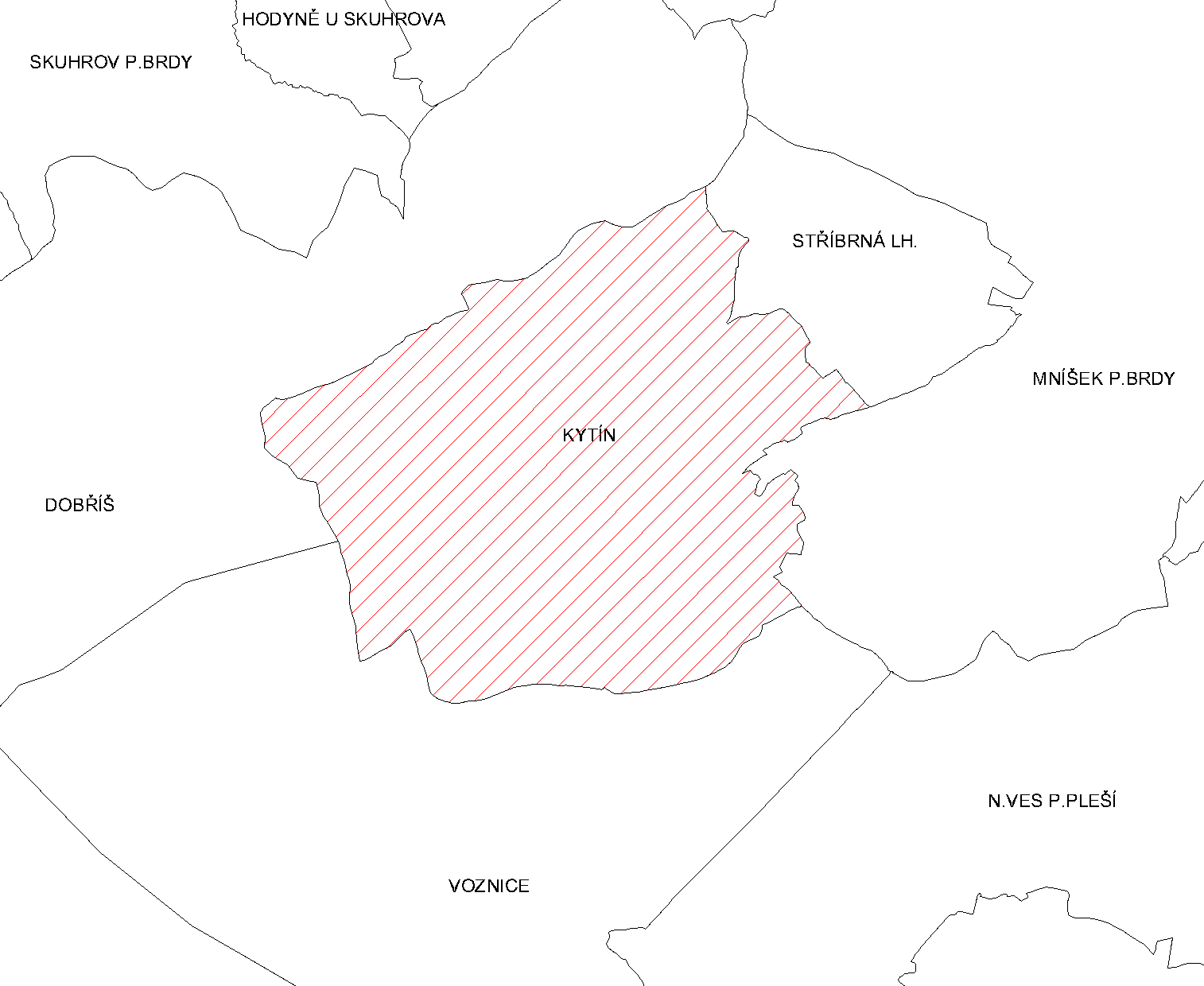 Katastr Želechovic n/D